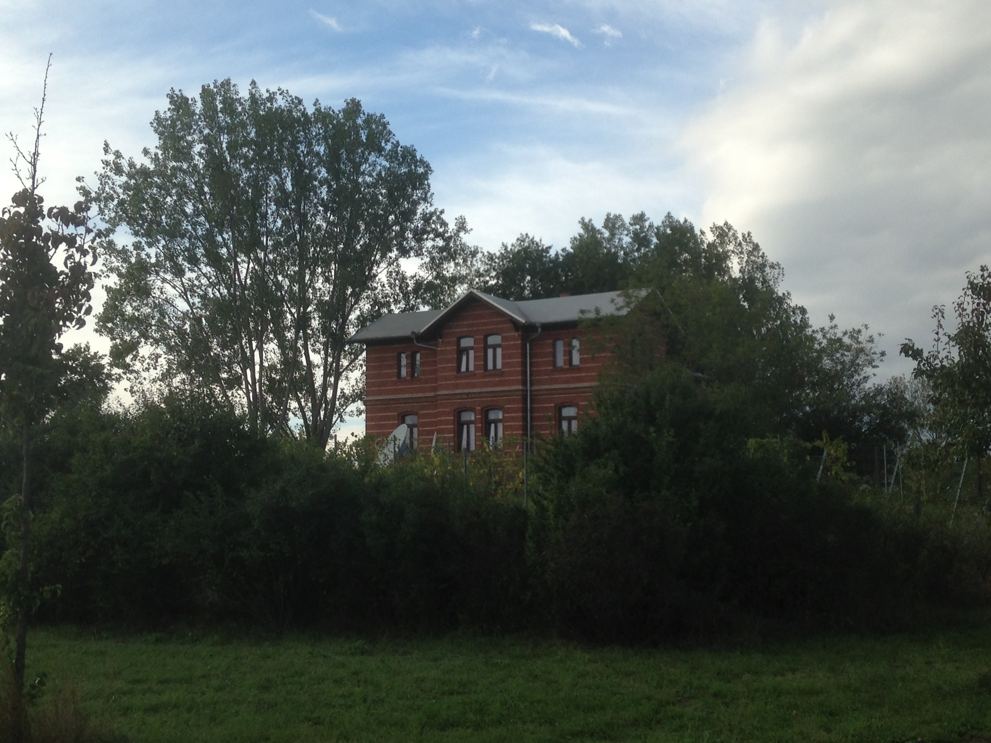 Gebäude ehem. Irrenanstalt Nietleben